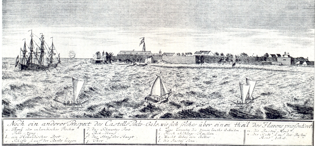 Ansicht Ponto Gale mitte 18. Jhdt